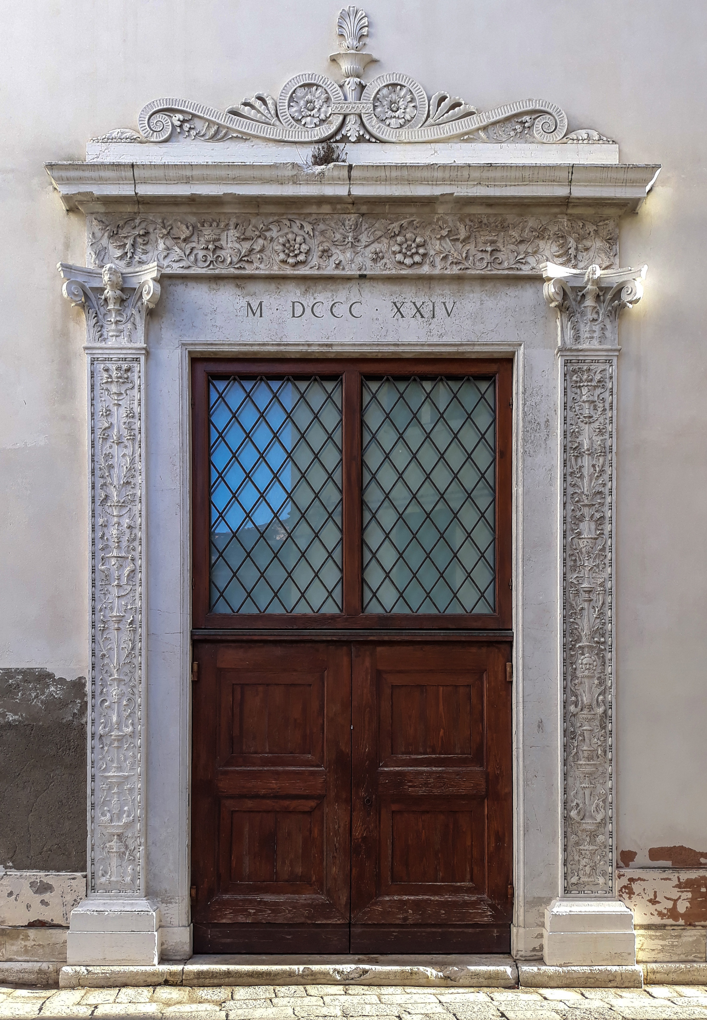 Portale della scomparsa chiesa di San Nicolò di Castello ora porta secondaria alle Gallerie dell'Accademia